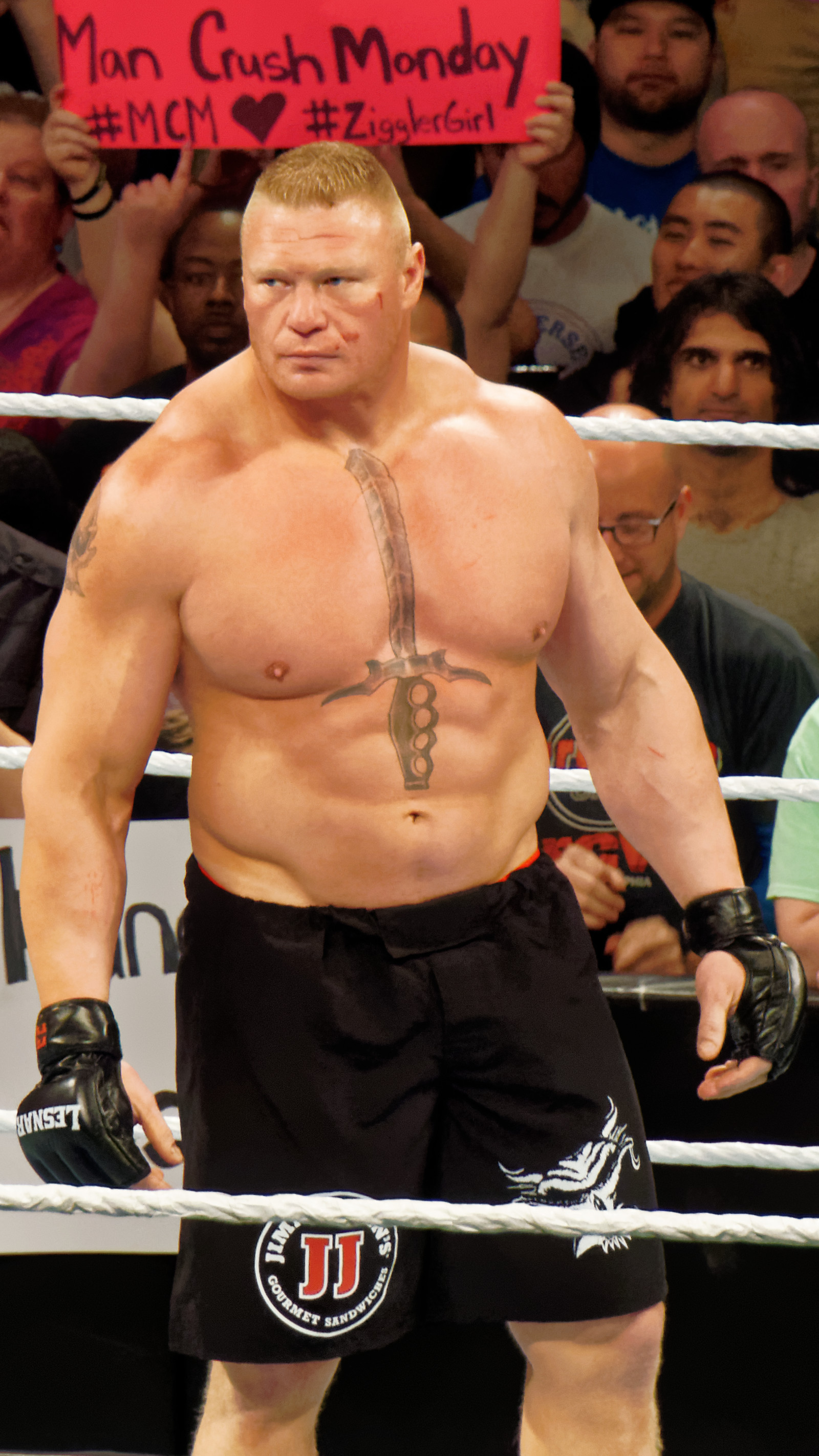 2015-03-30_17-02-37_ILCE-6000_0508_DxO